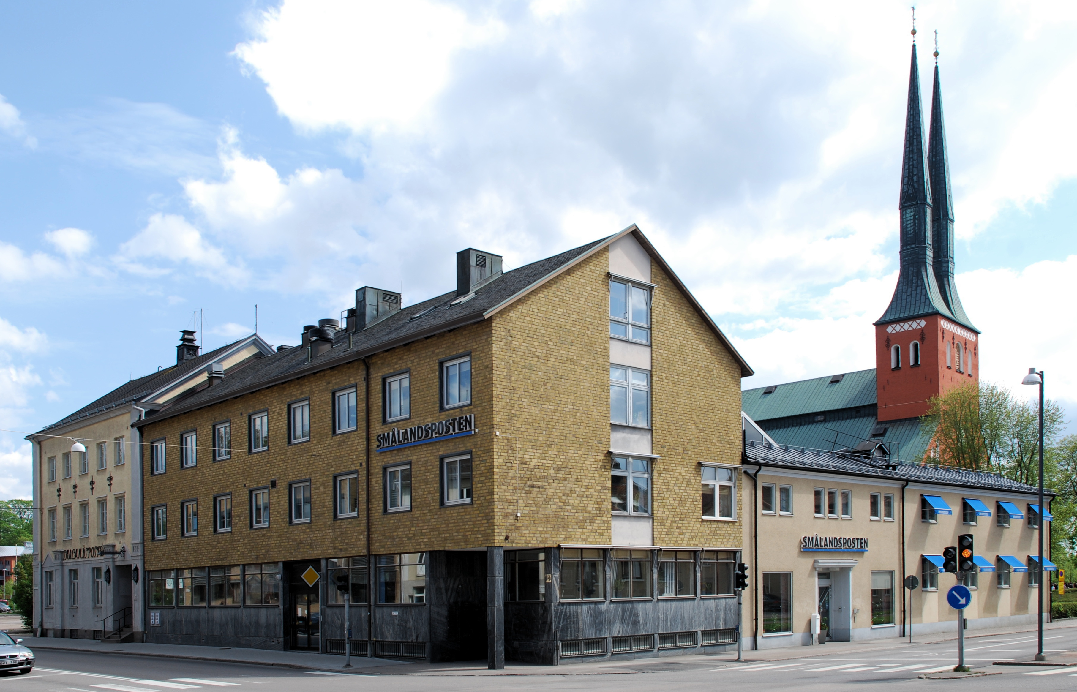 Smålandspostens hus